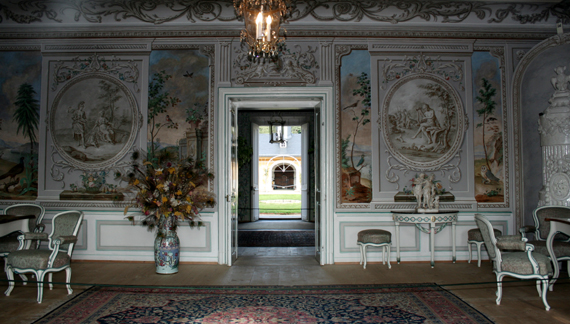 Interiér klasicistního loveckého zámku Kozel v okrese Plzeň-jih, Česká republika.